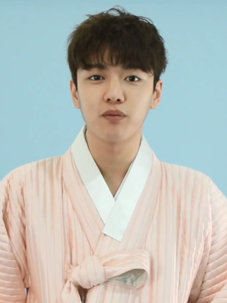 (TV10) 다이아·딘딘·모모랜드·신원호·엔씨아, 스타들의 설 인사 (Feat. 한복 인터뷰)